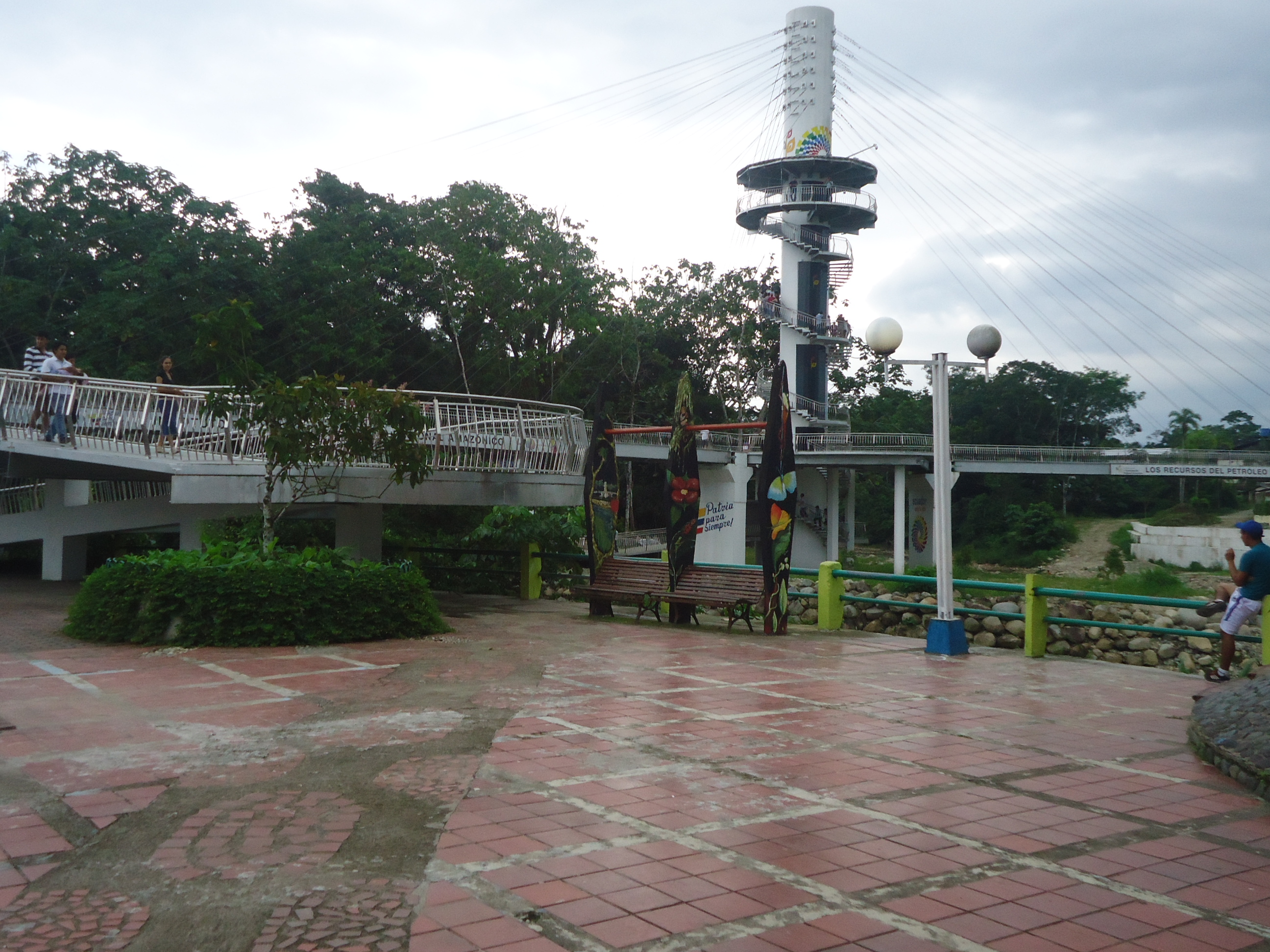 Malecón y Puente Atirantado de Tena